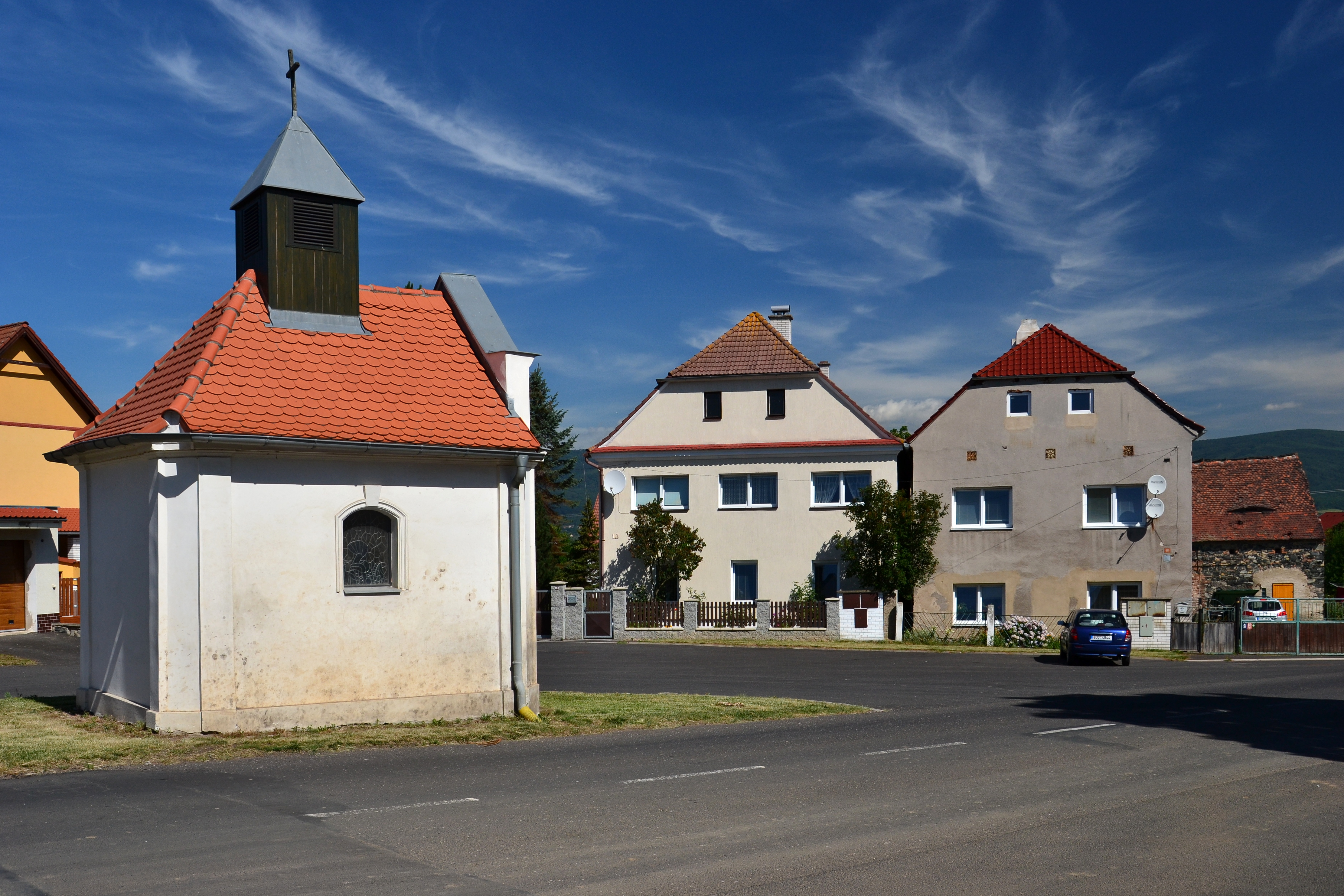 Kaple